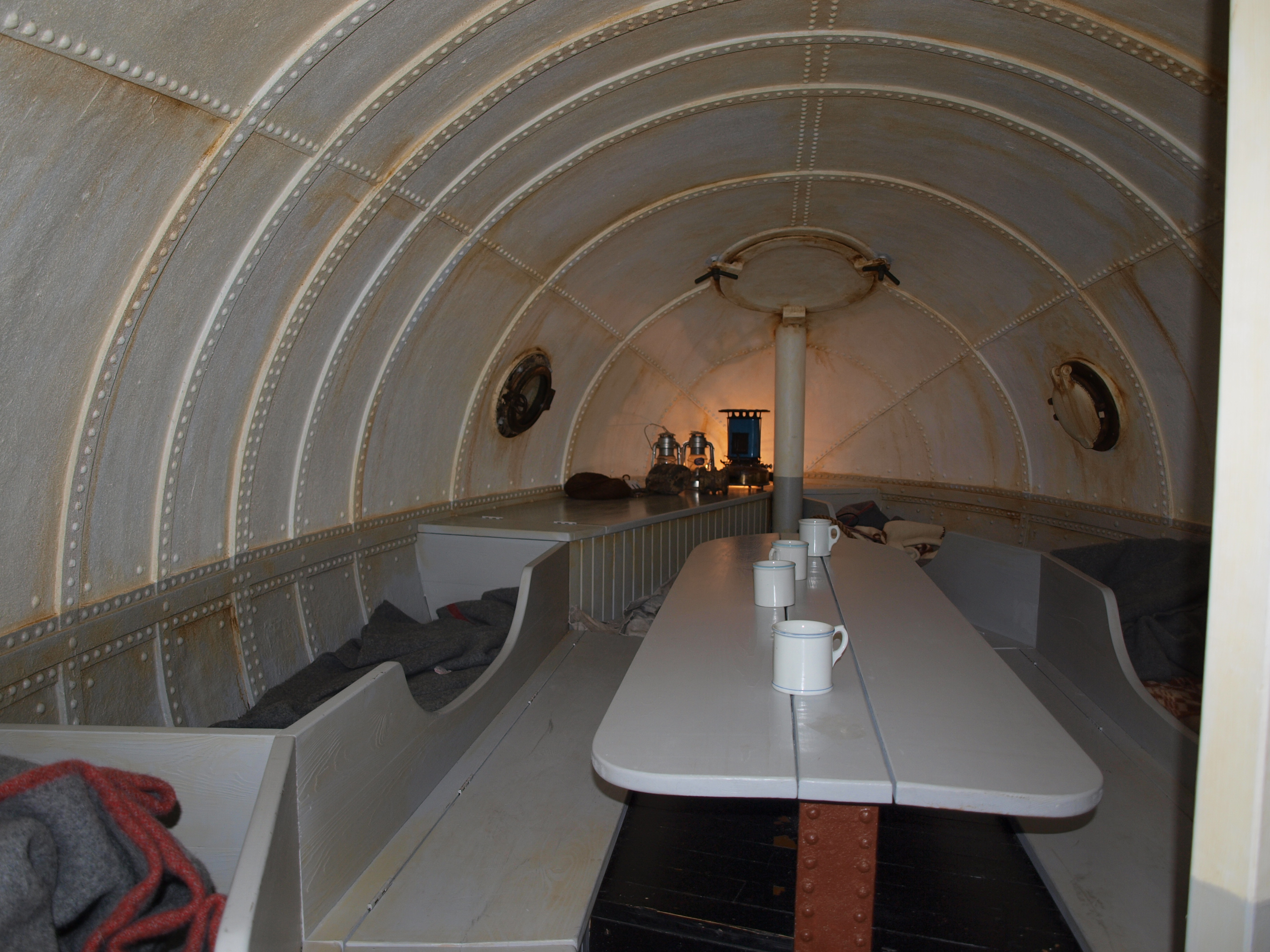 Interiør frå livbåten som [{:nn:Ole Brude]segla over Nord-Atlanteren med i 1904